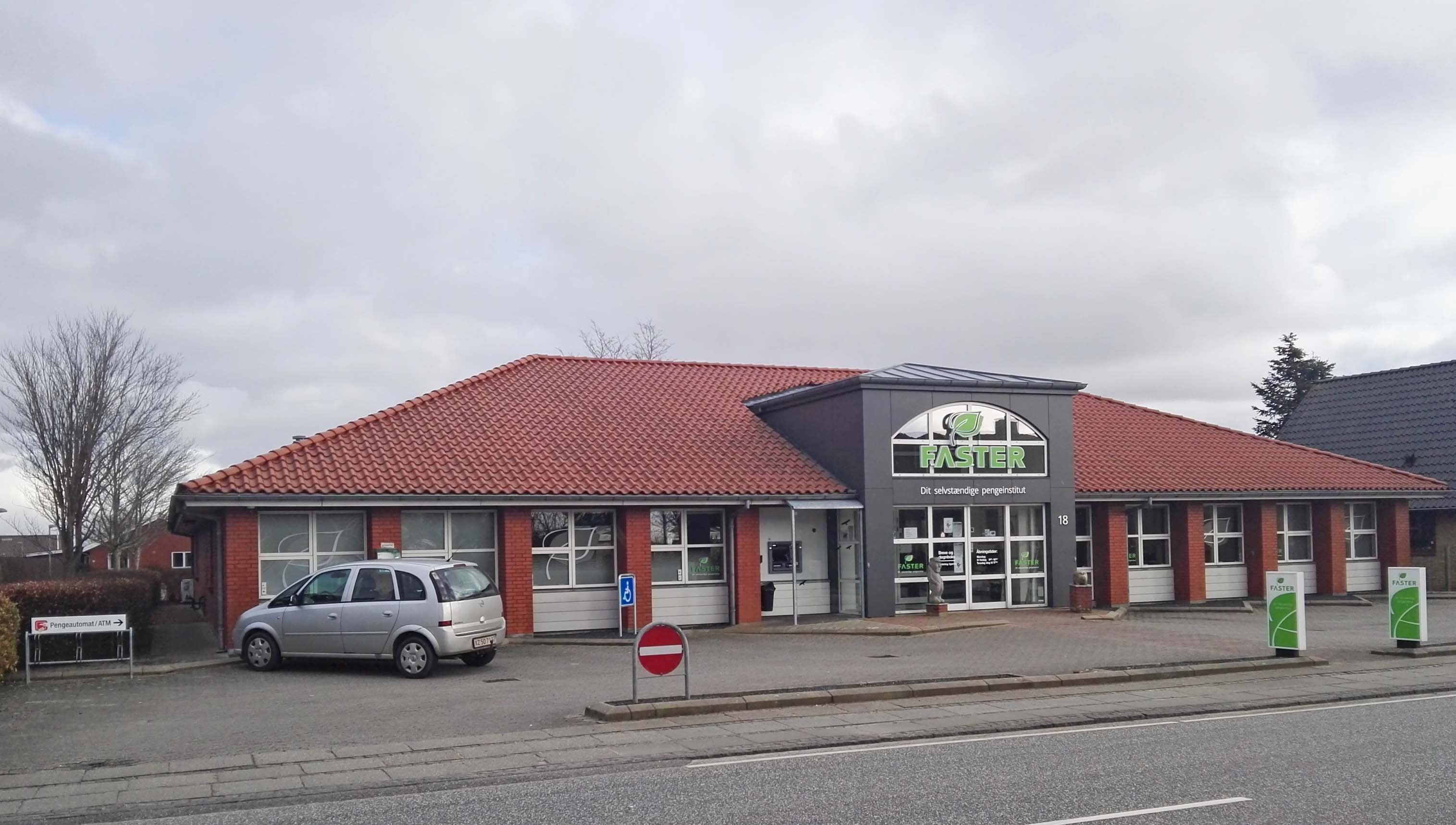 Faster Andelskasse i Astrup